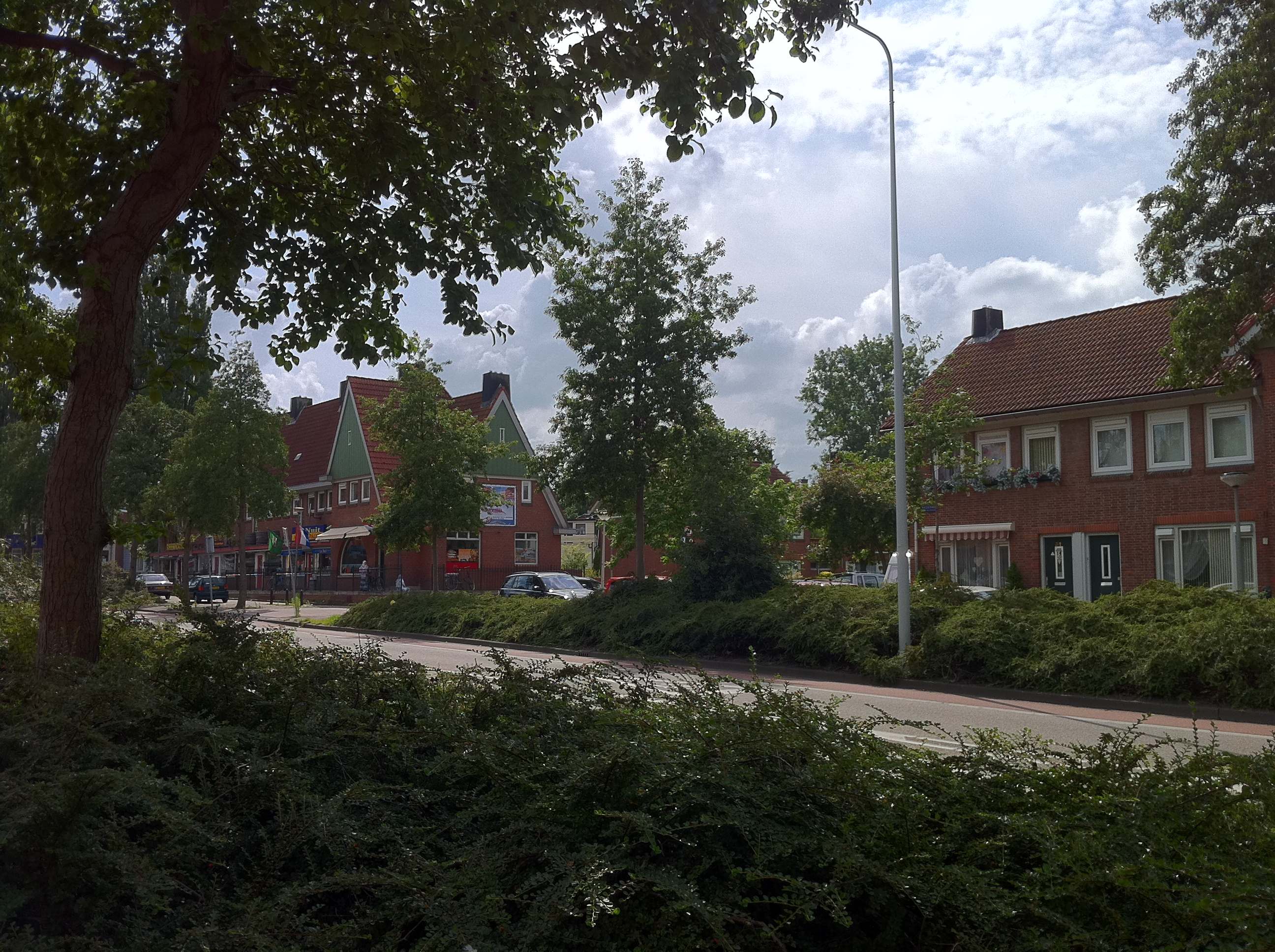 Waddenweg in Tuindorp Buiksloot Amsterdam-Noord